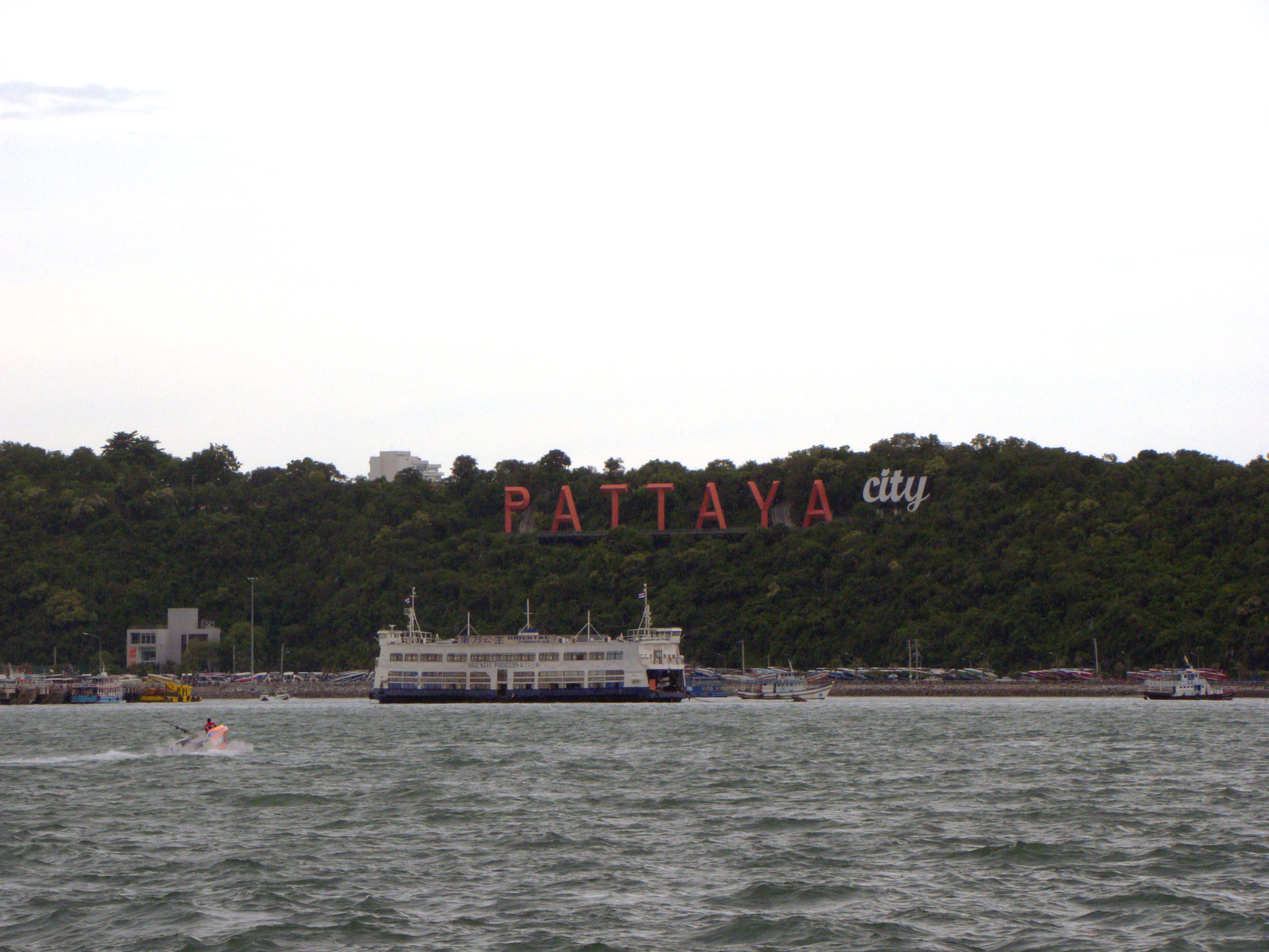 pattaya,Thailand